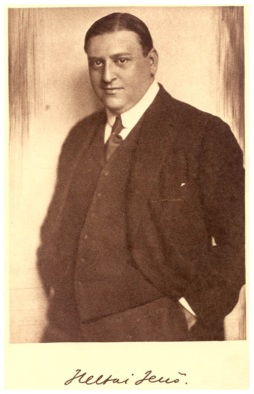 Heltai Jenő (1910 körül) Országos Széchényi Könyvtár/ Színháztörténeti Tár: KA 7774/3